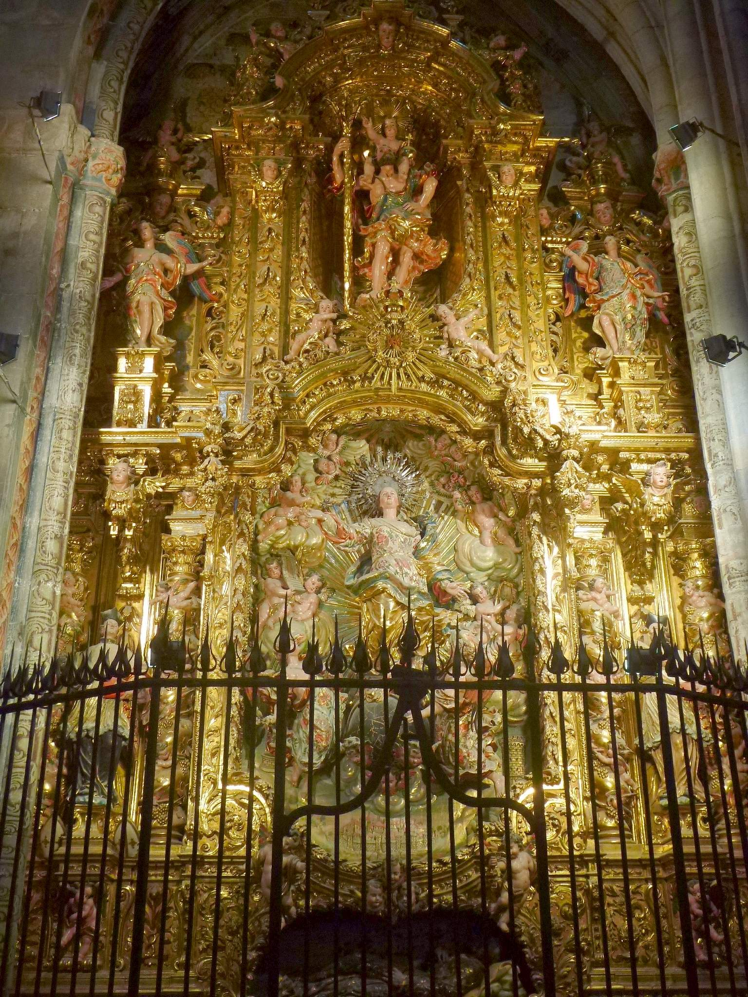 Girona - Catedral, Capilla de la Inmaculada